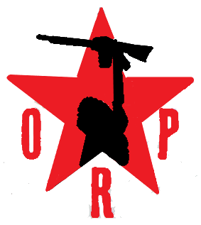 Imagen usada en los comunicados de la Organización Revolucionaria del Pueblo